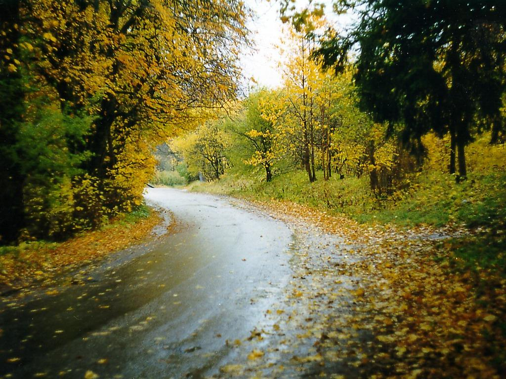 Talsu ceļš pie Sukturiem 1998-10-17